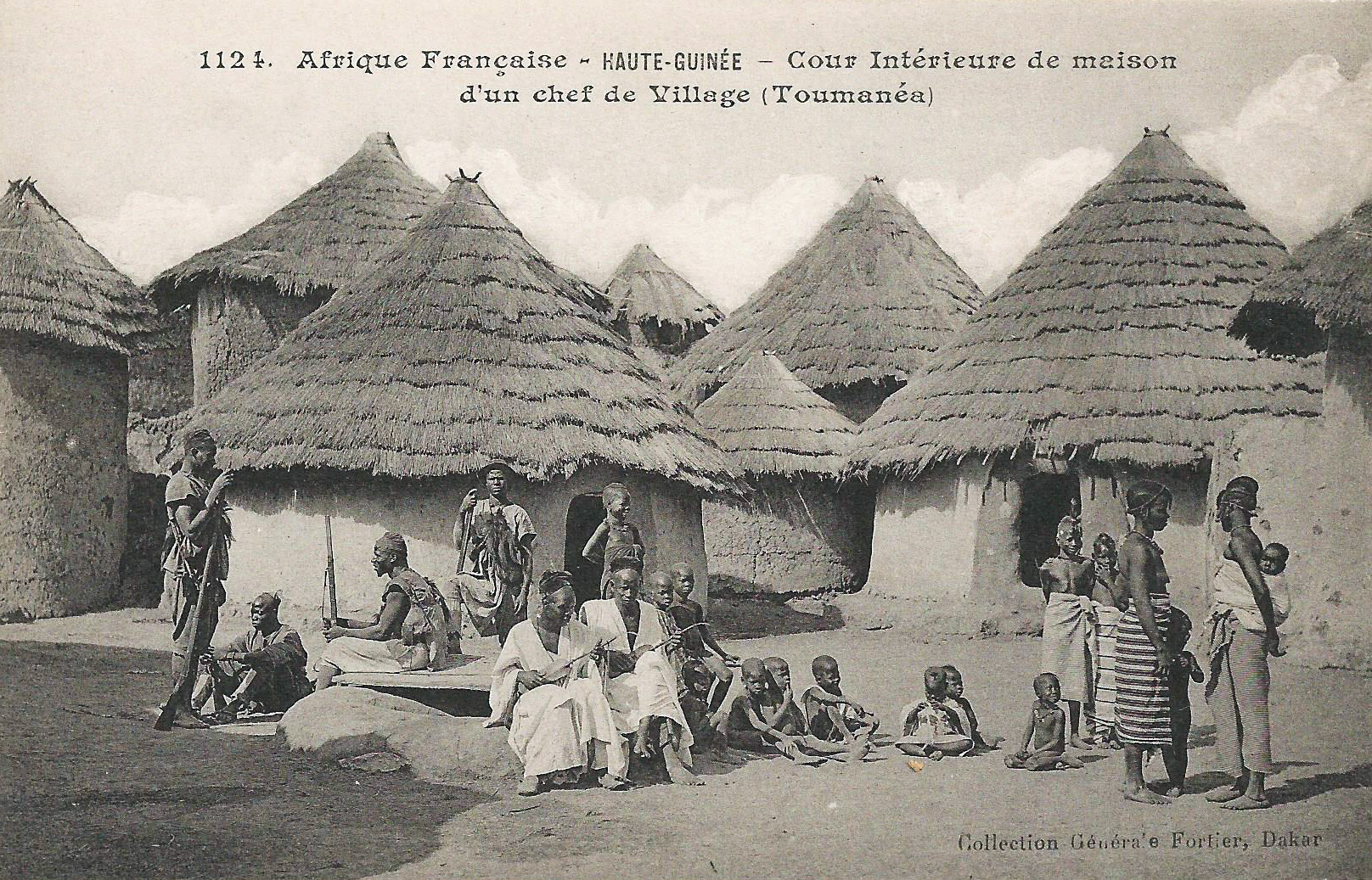 François-Edmond Fortier, Toumanéa. Cour intérieure de maison d'un chef de village. Afrique française. Haute-Guinée